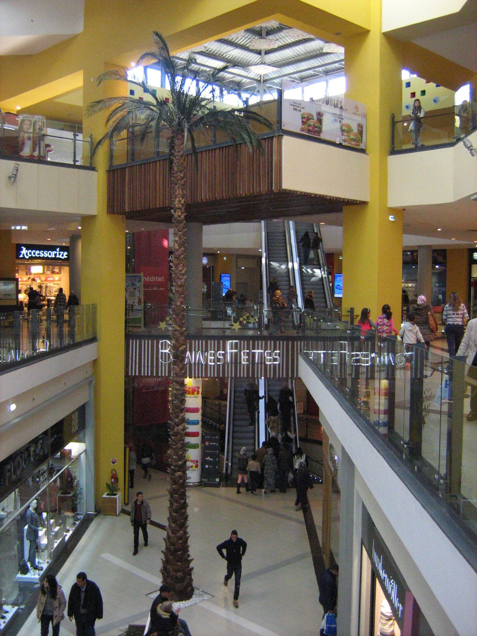 Intérieur du centre commercial Borj Fès, Maroc.